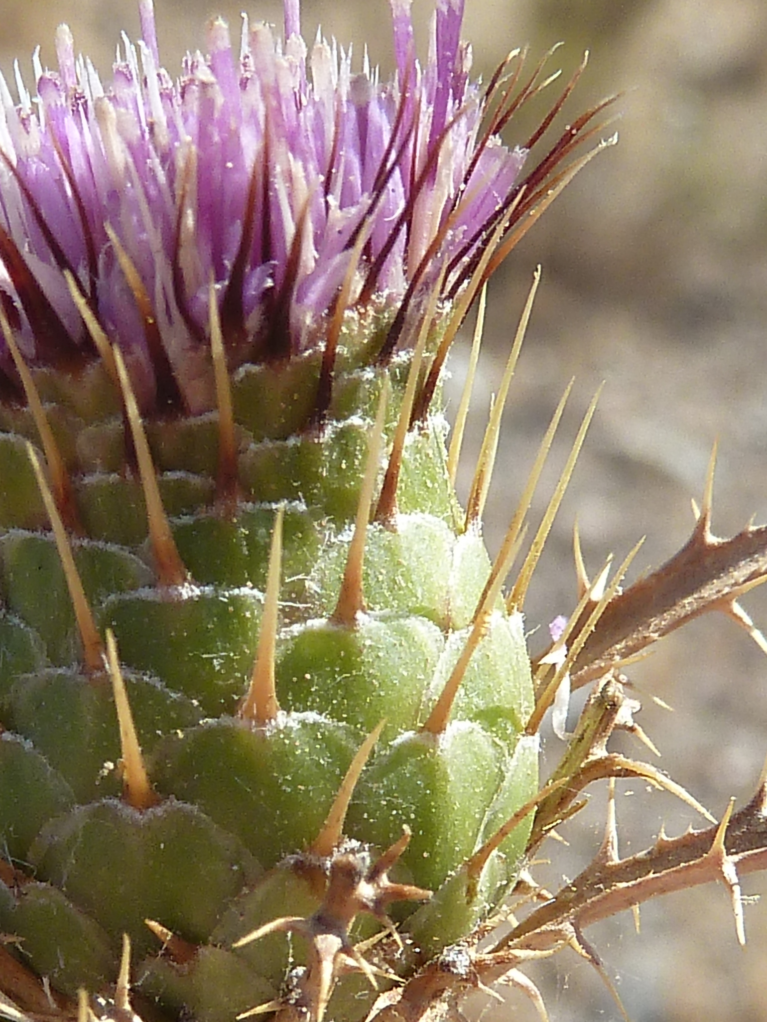 Atractylis humilis - Capítulo en antesis; detalle de las brácteas involucrales apicalmente espinosas. - circa circumvalación Norte, Águilas (Provincia de Murcia, España).